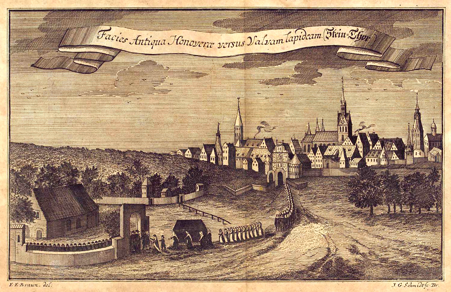 Kupferstich von Johann Georg Schmidt nach einer Zeichnung von E. E. Braun, im Schmuckband mit dem Titel „Facies Antiqua Honoverae versus Valvam lapideam (Stein-Thor)“ . Der Blick geht etwa vom Klagesmarkt im Steintorfeld, also der Bereich vor dem Steintor als Teil der Stadbefestigung Hannovers. Dargestellt ist eine Leichnams-Prozession aus zahlreichen Menschen für eine offenbar hochgestellte Persönlichkeit, die sich bis durch ein - weiteres - Tor des Alten St.-Nikolai-Friedhofs erstreckt. Links im Bild ist die Nikolaikapelle zu sehen, im Hintergrund insbesondere die Kirchtürme der Stadt. Das Blatt, hier als elektronisch bearbeiteter Ausschnitt, stammt aus Christian Ulrich Grupens Origines Et Antiqvitates Hanoverenses oder Umständliche Abhandlung von dem Ursprunge und den Alterthümern Der Stadt Hannover : Worinnen mit Urkunden, Siegeln und Kupfern Der Zustand der Stadt und der herumliegenden Graf- und ..., Göttingen : Universitets-Buchhandlung, 1740, also aus dem Jahr, bevor das Steintor abgebrochen wurde ...